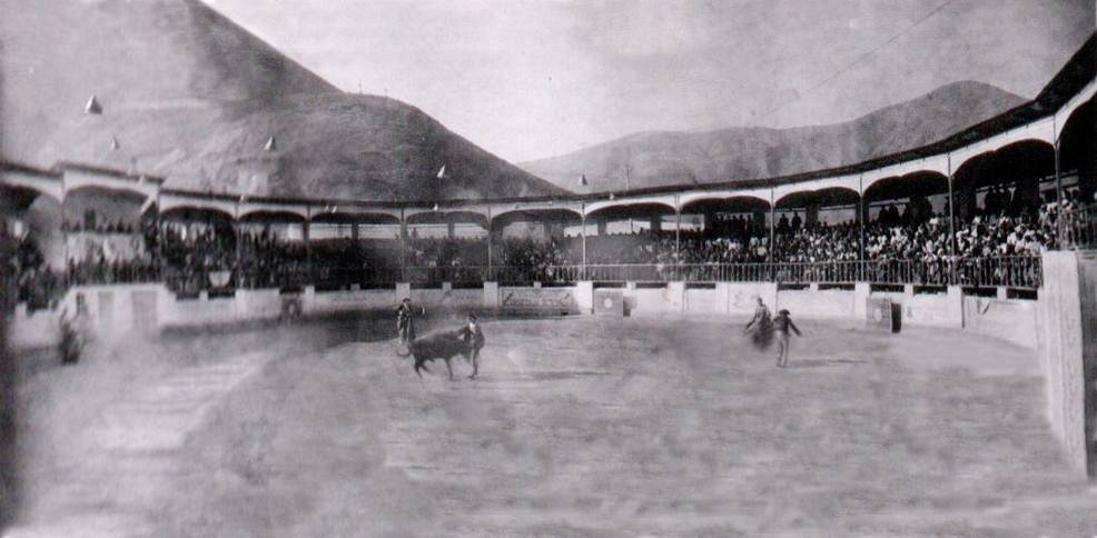 La ex plaza de toros Juan Belmonte de Tarma, destruido en el año 1968.